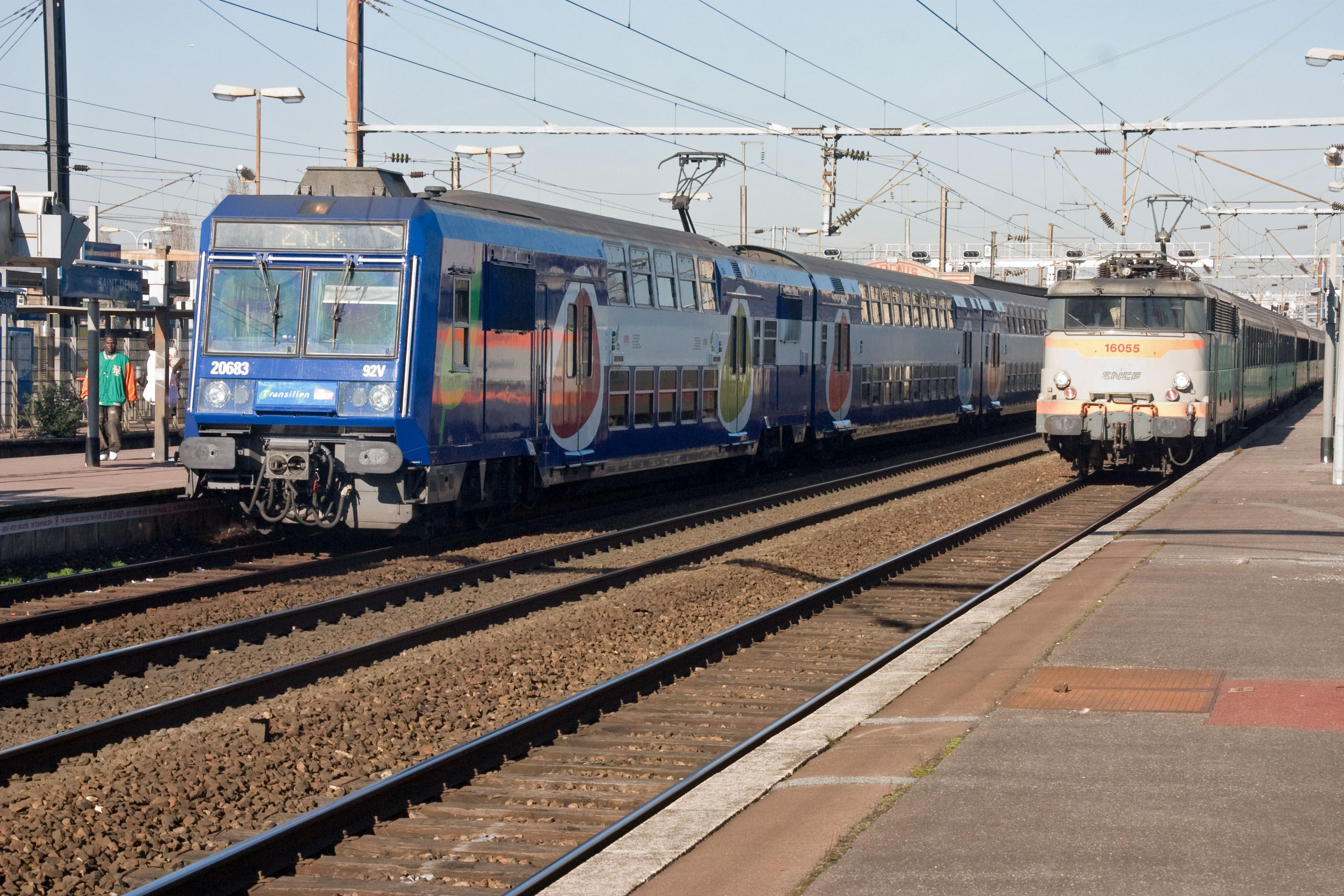 Gare de Saint-Denis, Saint-Denis, département de la Seine-Saint-Denis (France)